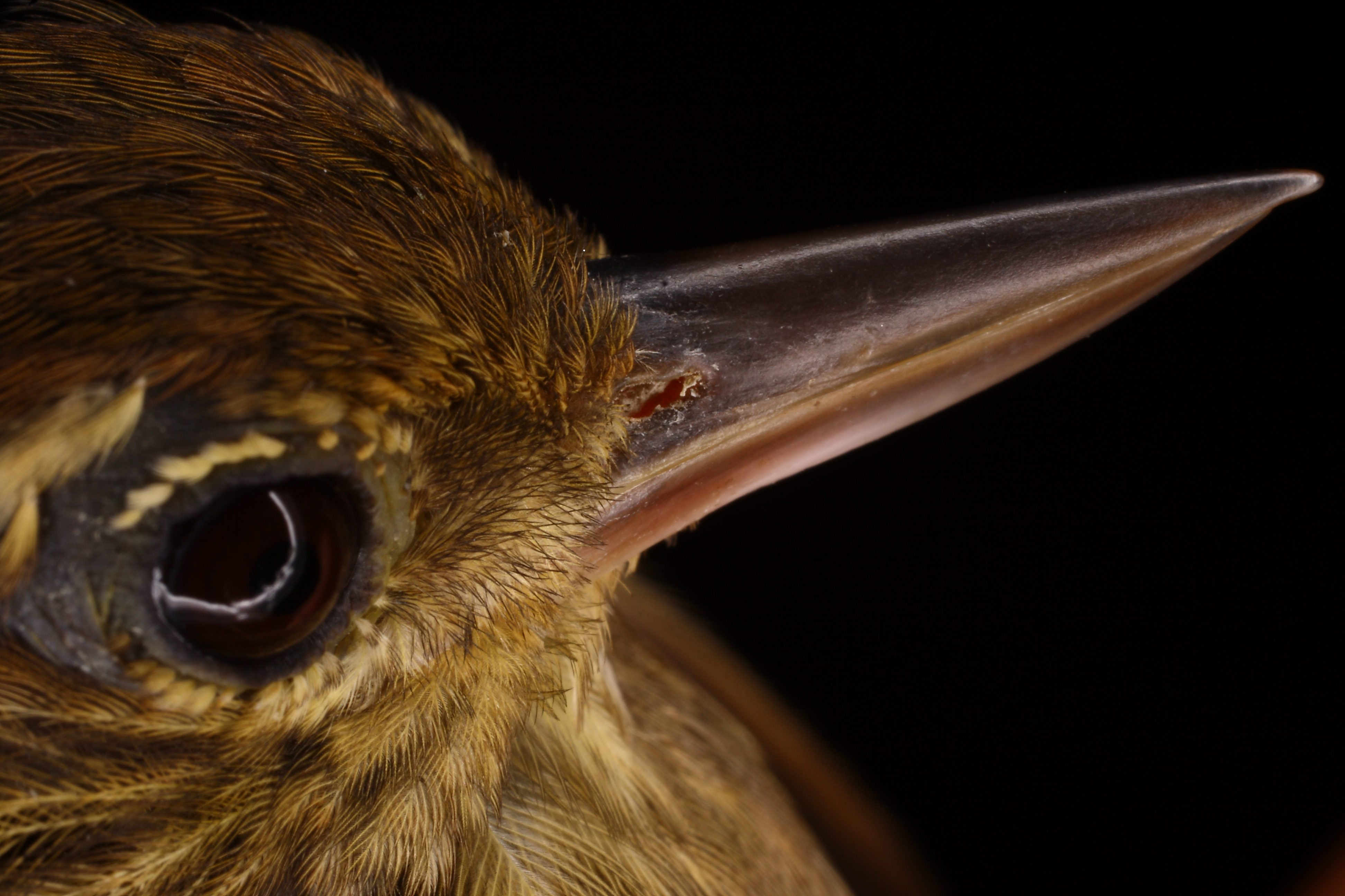 Xenops minutus